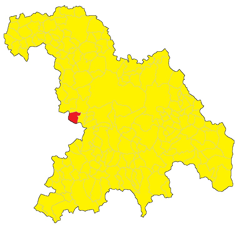 Mappa del comune di Bergamasco (AL)